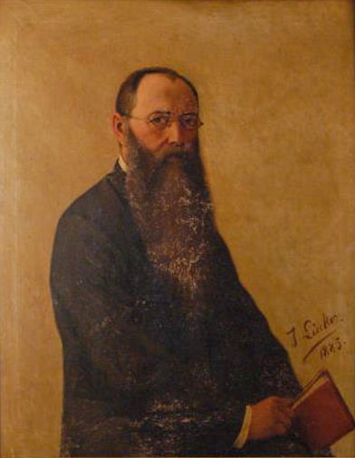 Zelfportret (1883) van Joseph Lücker